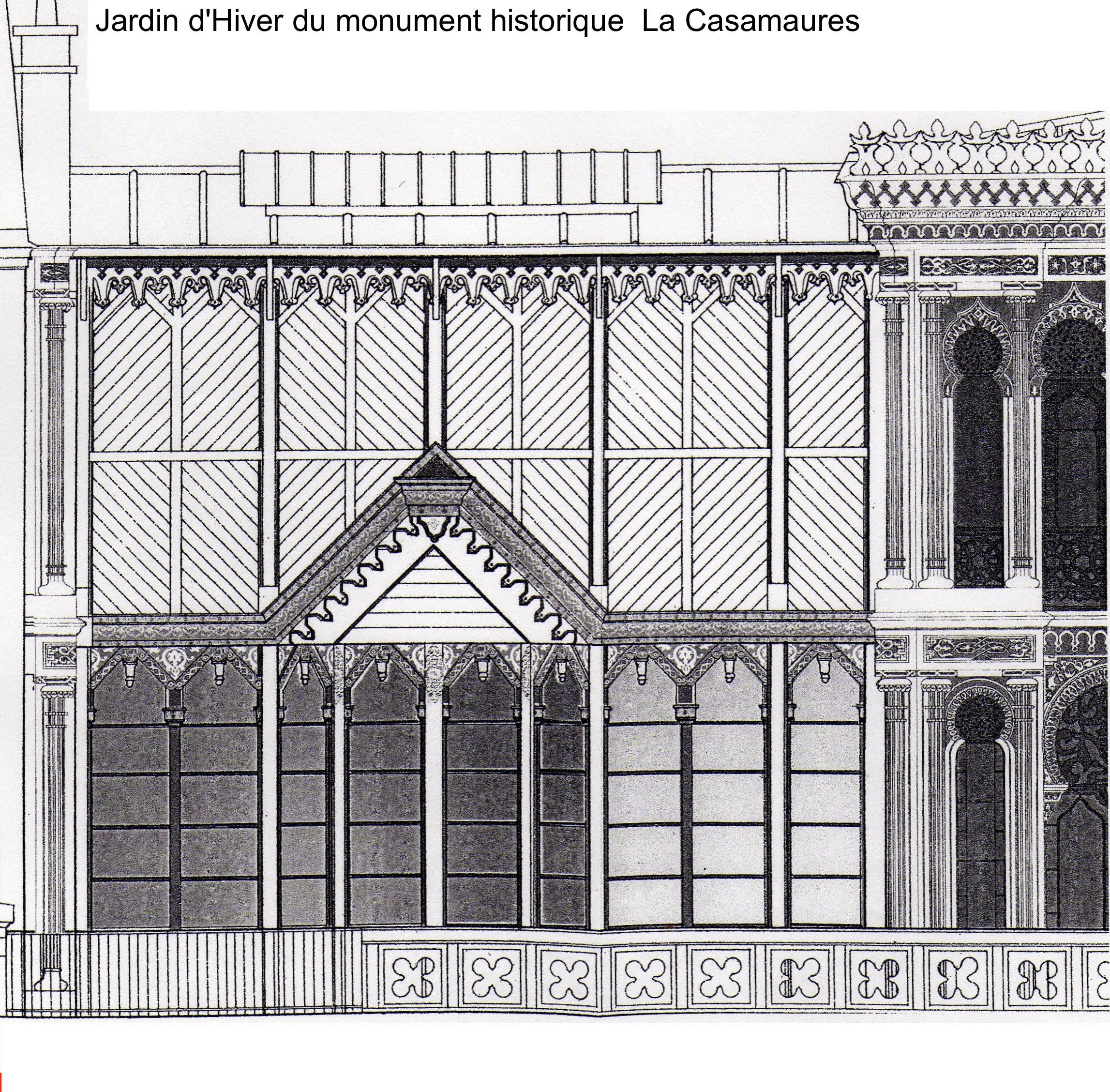 façade du jardin d'hiver. La Casamaures, Saint-Martin-le-Vinoux, France. EP Diagnostique et propositions d'interventions. III - 17